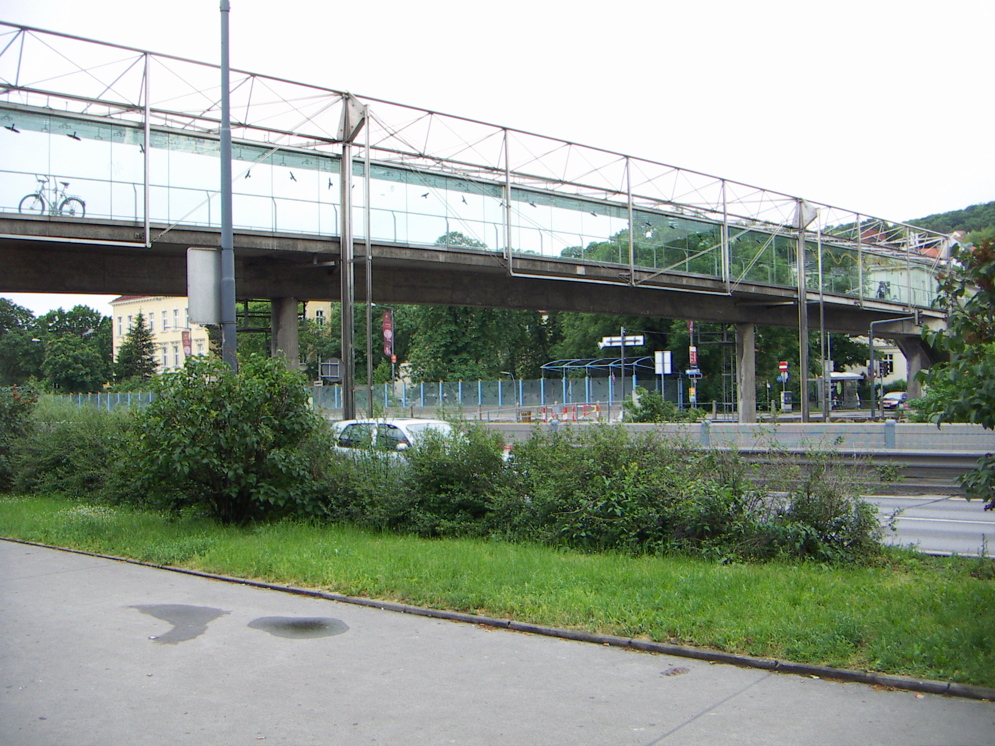 Hackinger-Steg, Fußgängerbrücke über den Wien-Fluss, Nähe U4 und Bahnhof Hütteldorf ÖBB